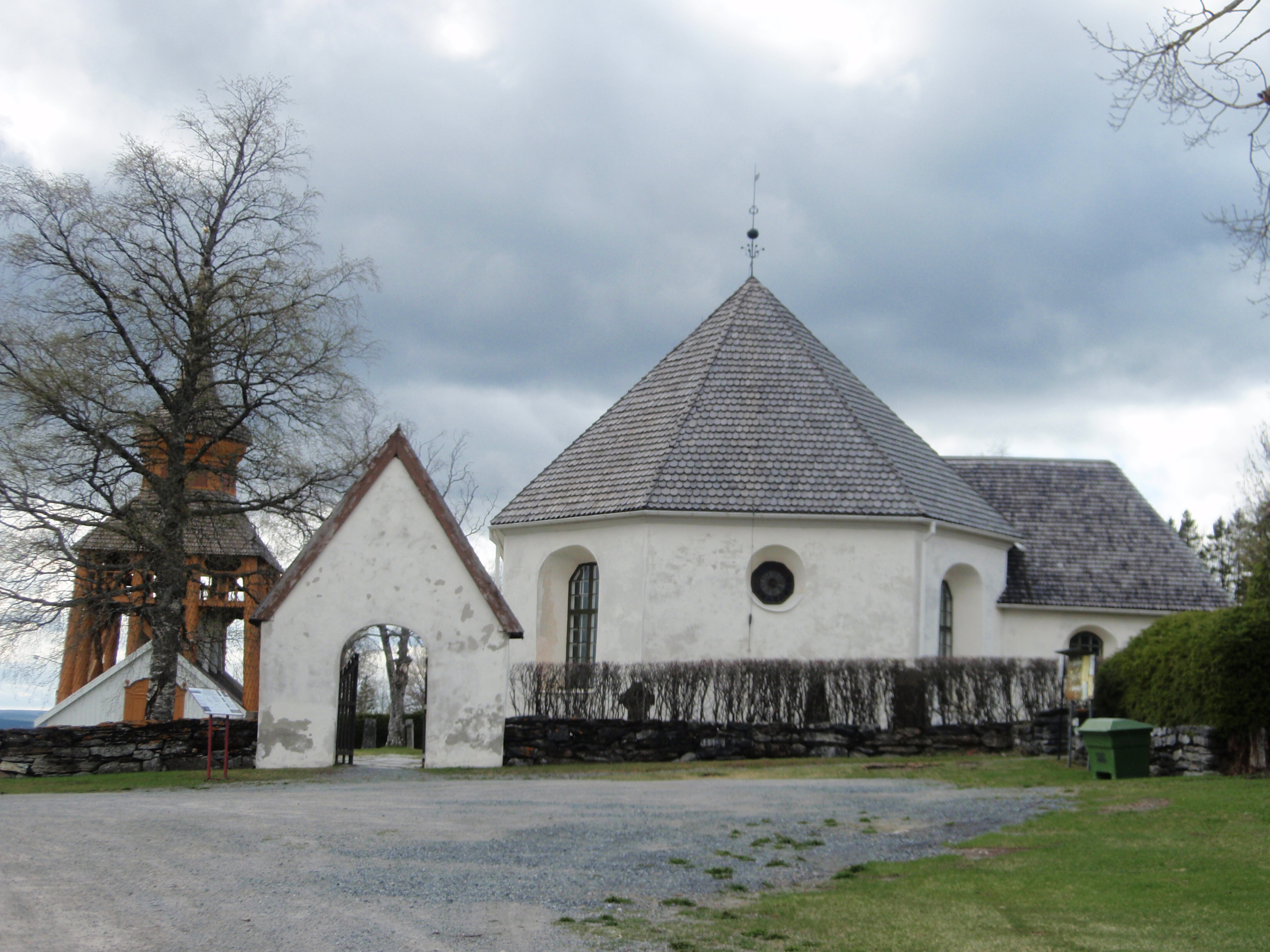 Mattmar kyrka